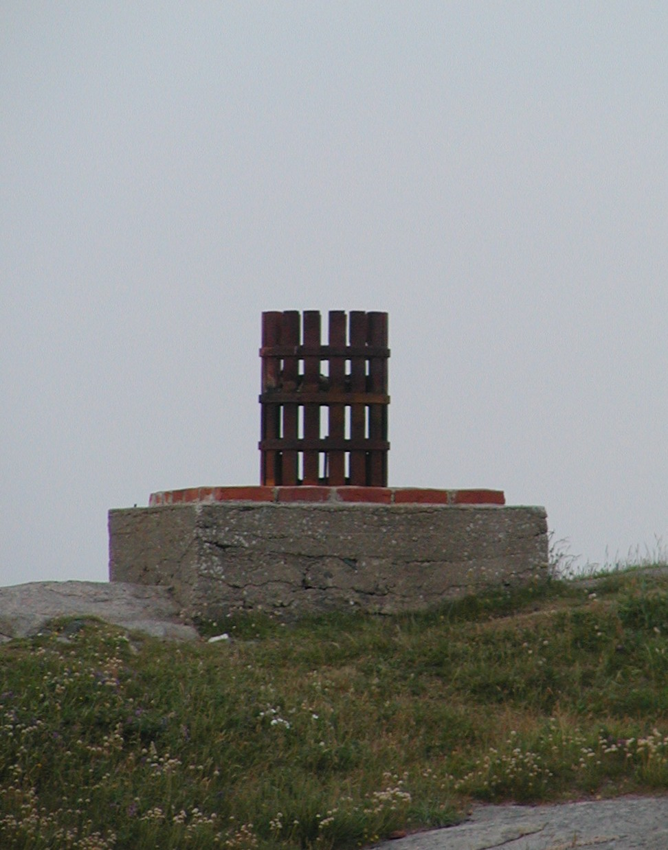 Lindesnes fyr (Norwegen) - rekonstruiertes erstes Feuer